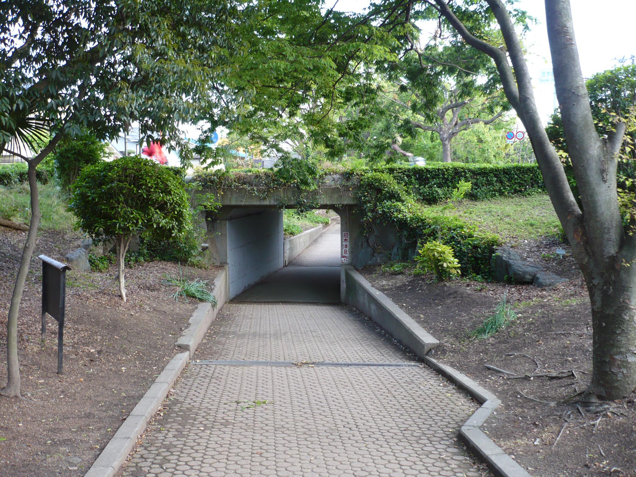 元茨木川跡